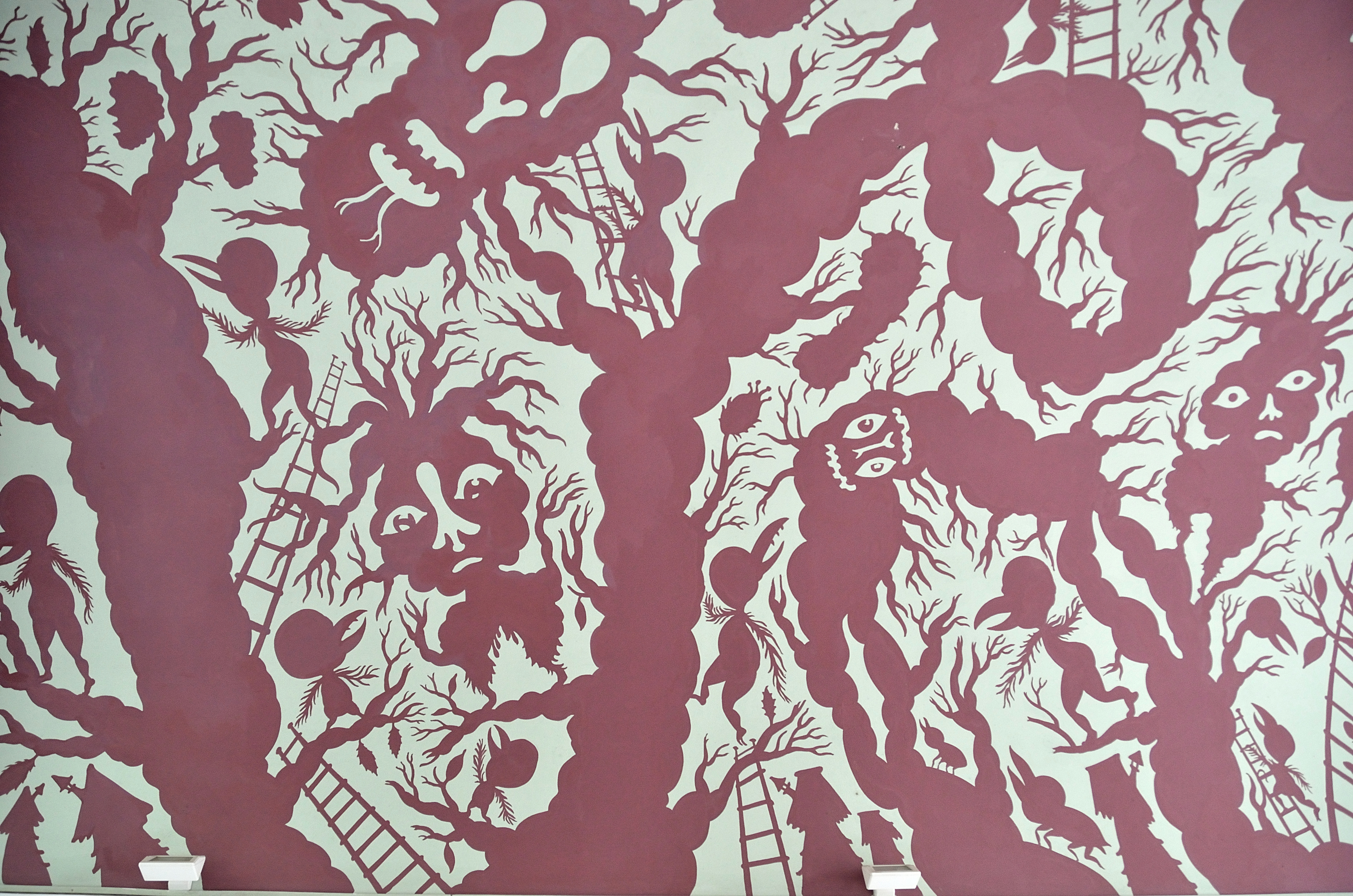 Deckenmalerei im MuseumsQuartier von Stéphane Blanquet aus dem Jahre 2007.